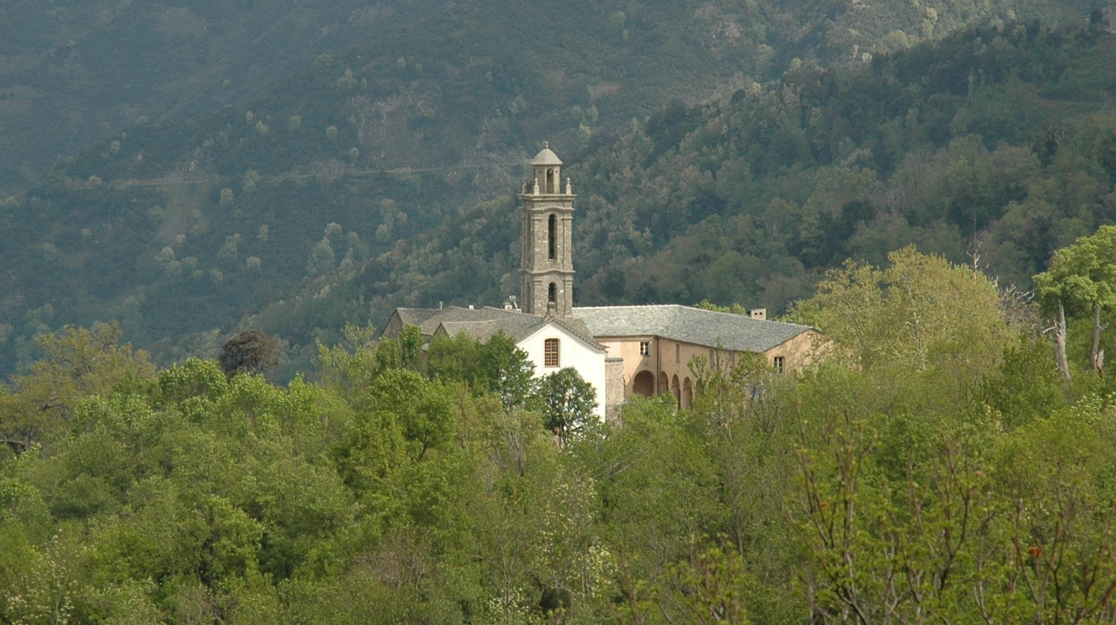 France - département Haute-Corse - Commune de Piazzali .